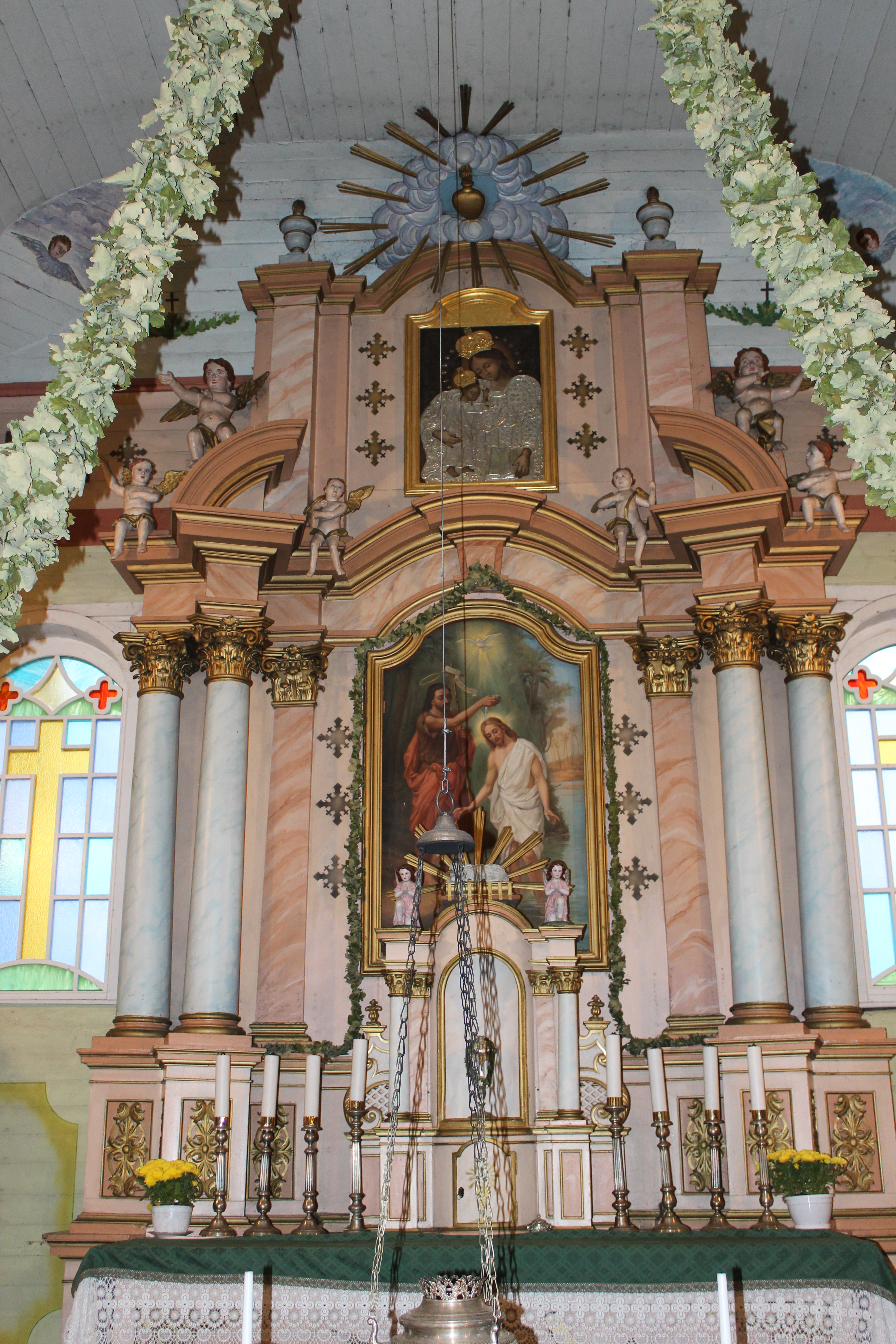 Bažnyčios interjeras